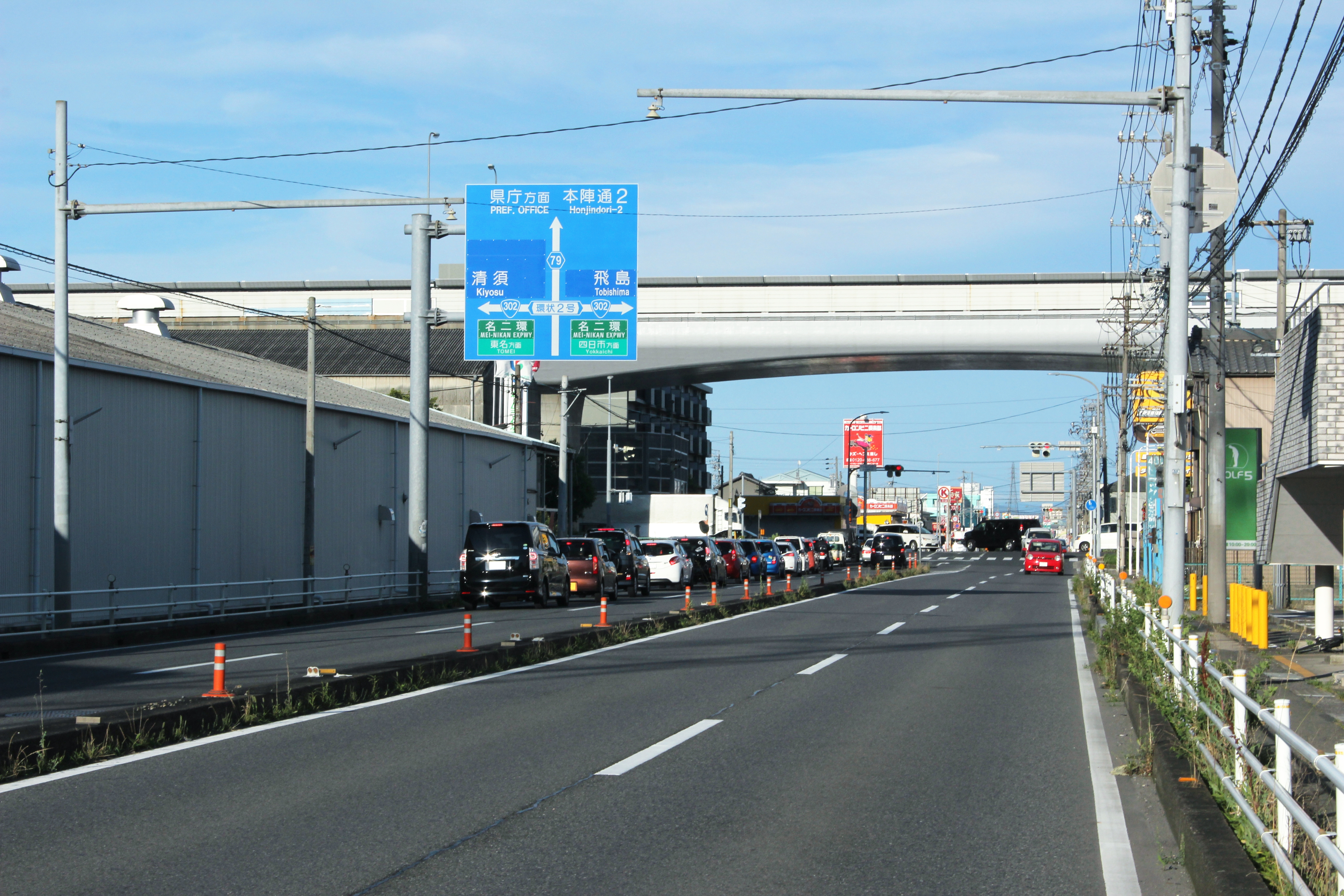 愛知県道79号と名二環との直交部